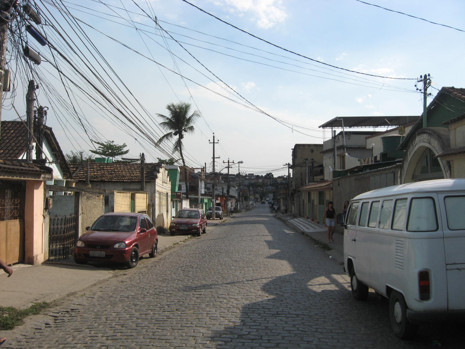 Vista da rua Inácio Serra, no bairro de Tomazinho, São João de Meriti, no estado do Rio de Janeiro, Brasil.